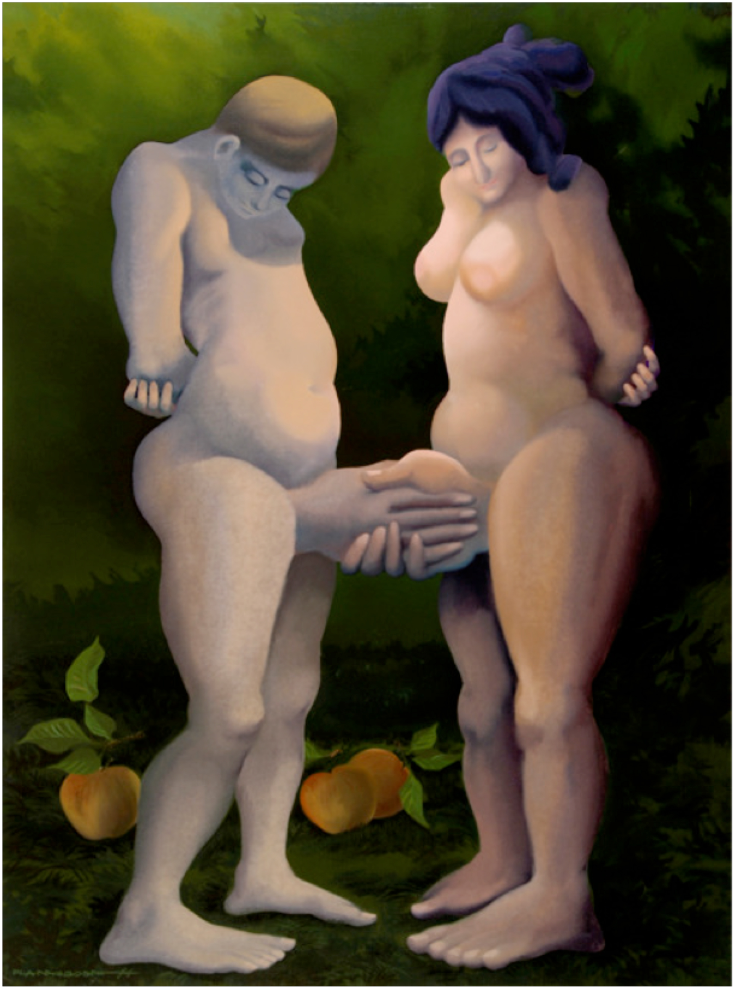 Oli de Josep Pla-Narbona